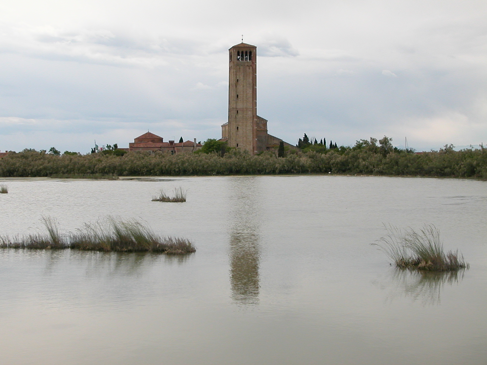 Venezia - Panorama con il campanile della cattedrale di Santa Maria Assunta a Torcello.